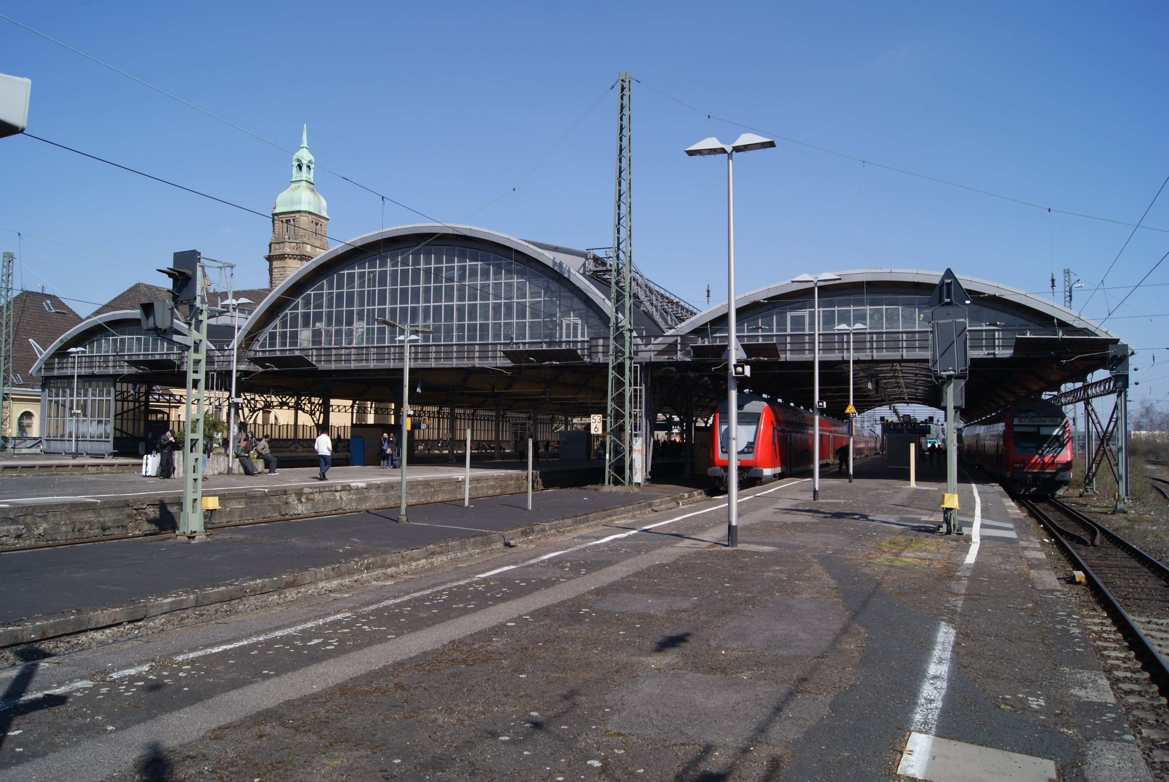 Blick auf die Bahnsteighalle des Krefelder Hauptbahnhofs aus Richtung Kleve (Westen).